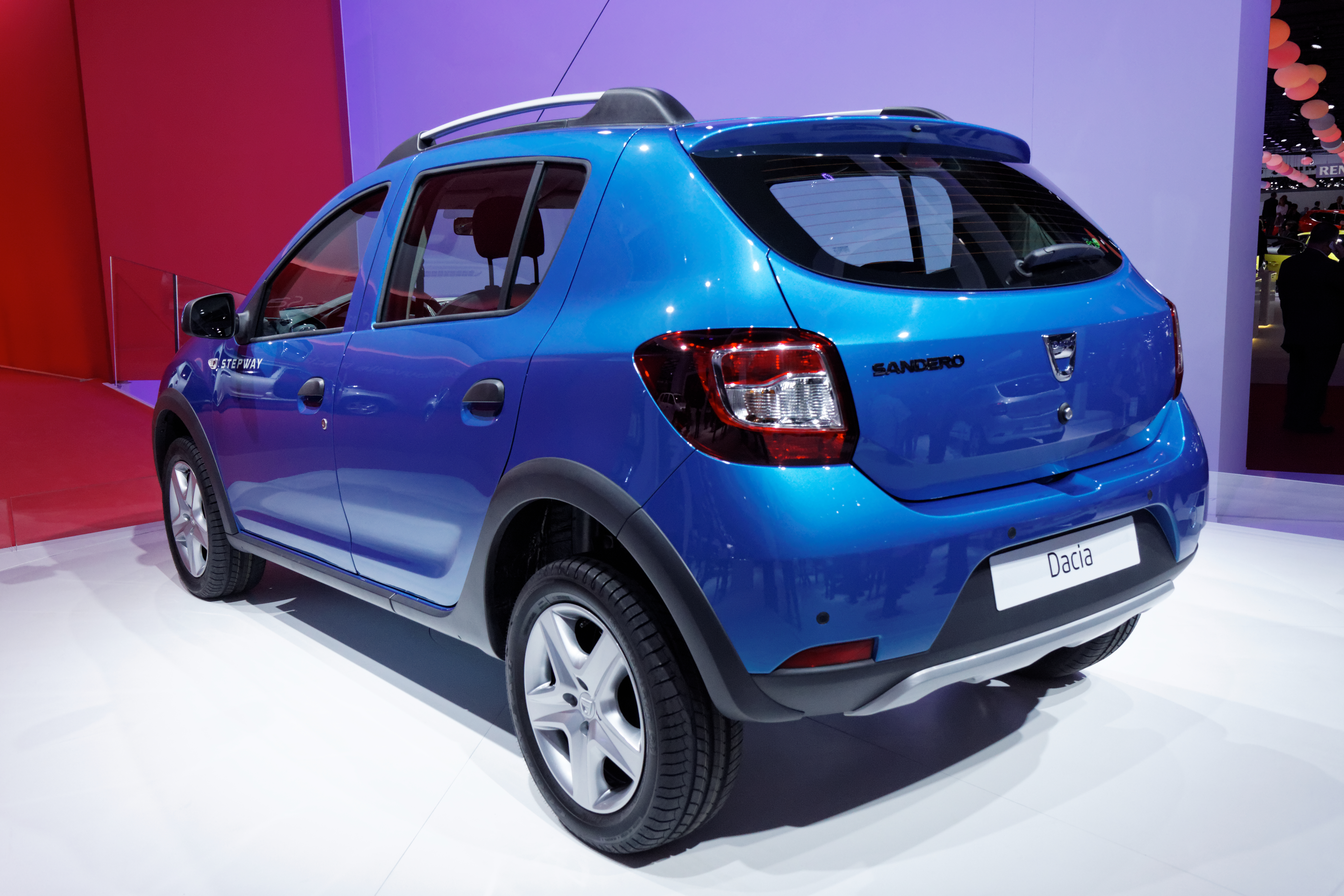 Une Dacia Sandero Stepway présentée lors du Mondial de l'automobile de Paris 2012.